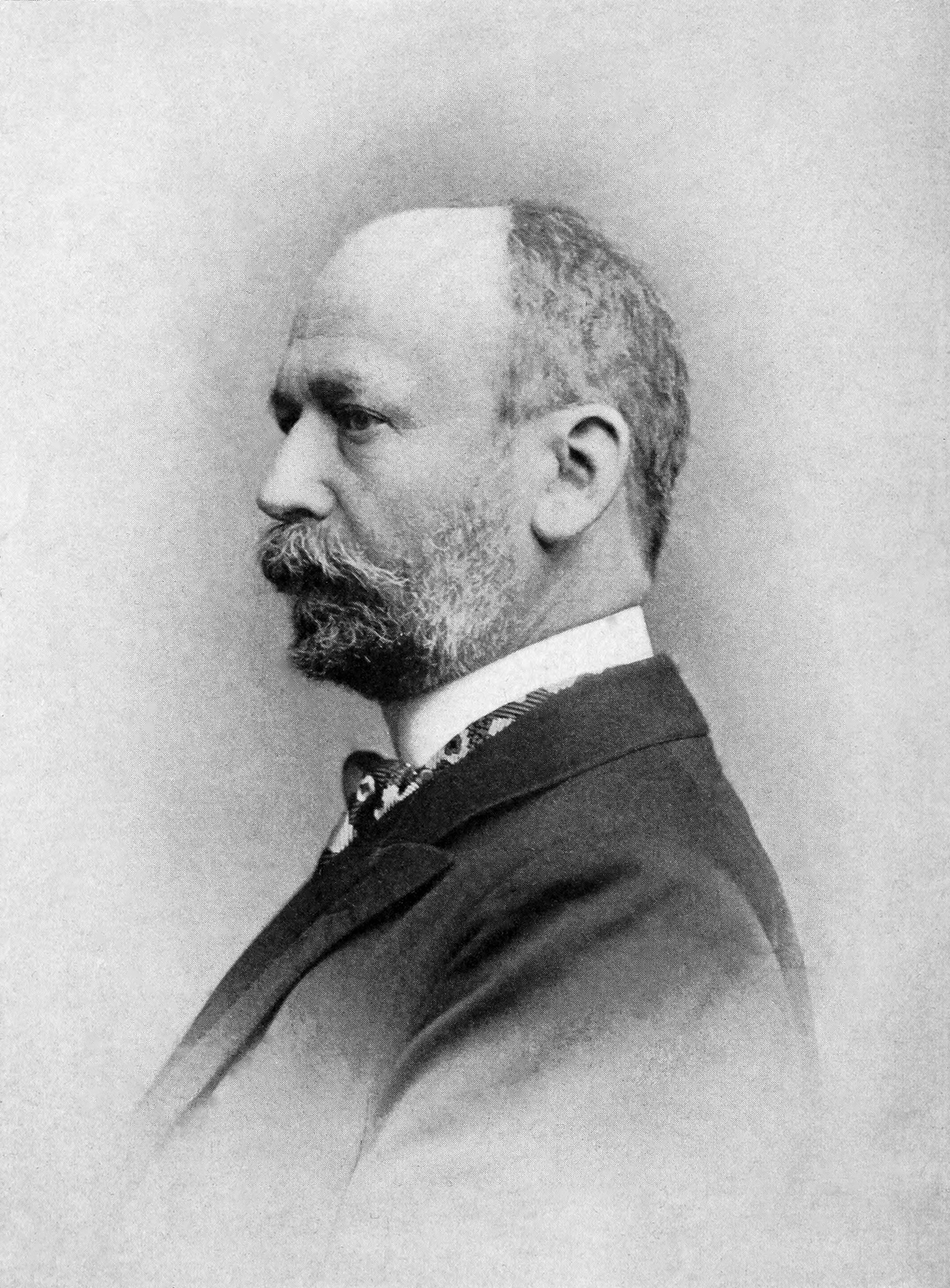 Friedrich Delitzsch